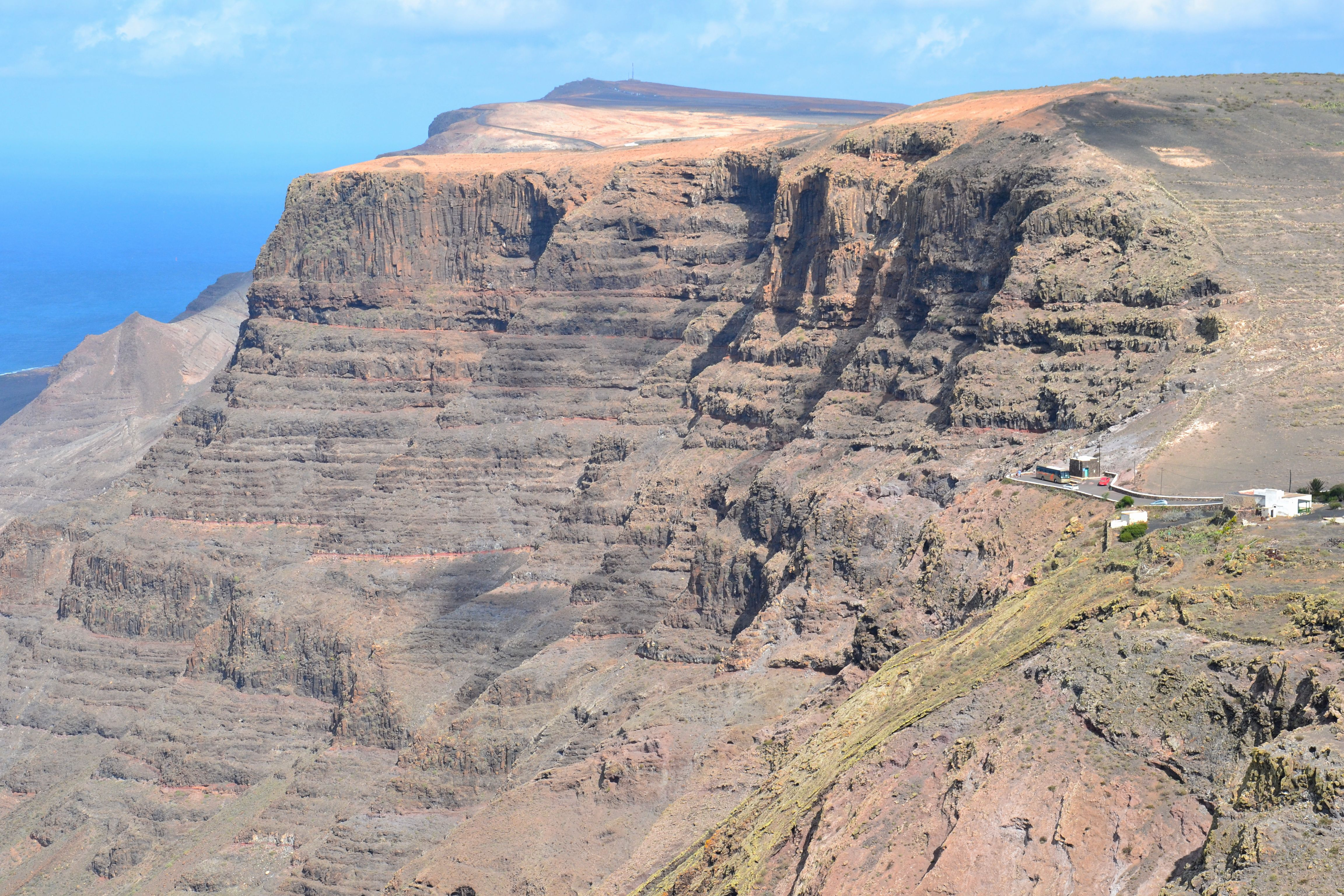 Mirador (Aussichtspunkt) de Guinate, Lanzarote, Kanarische Inseln, Spanien